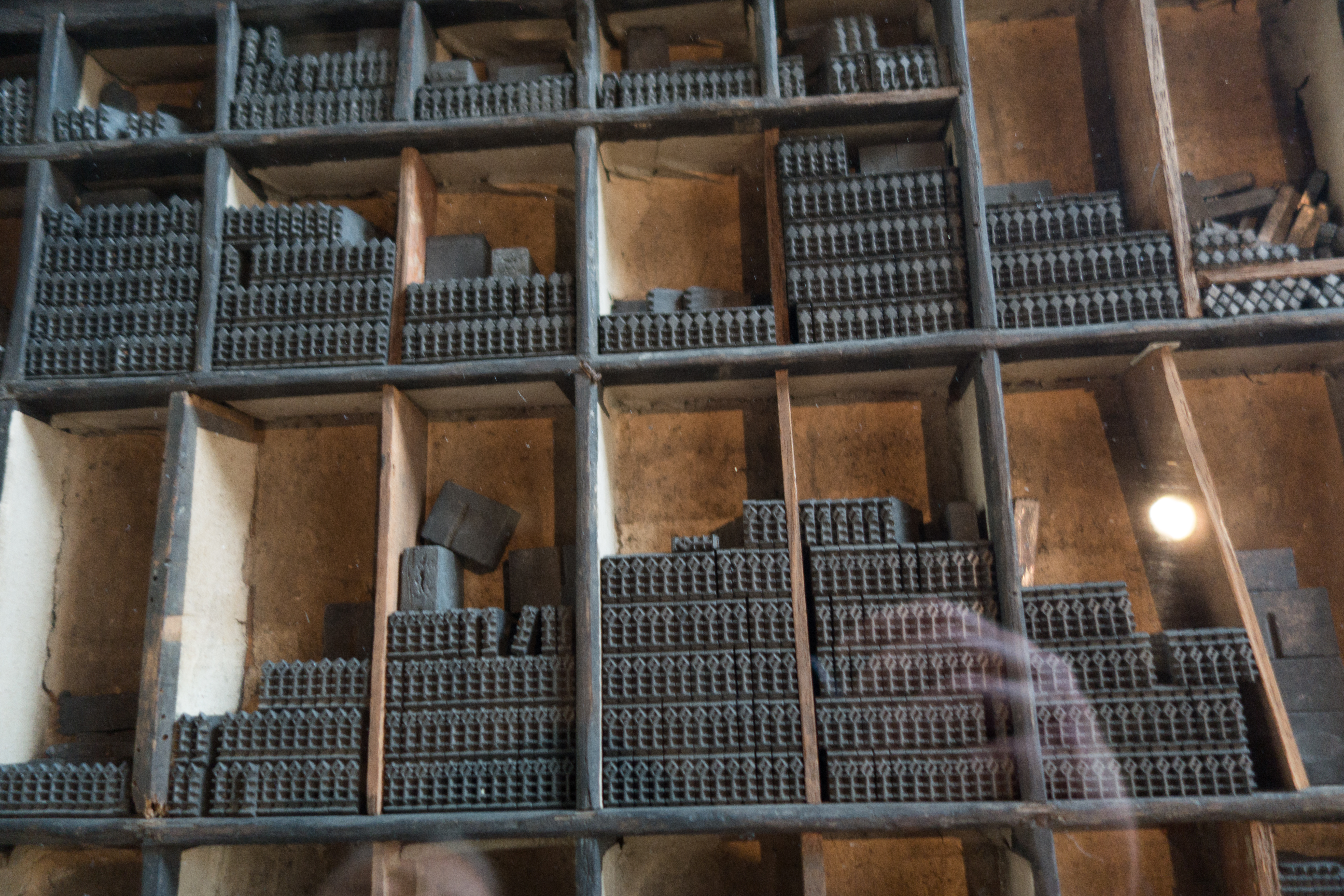 Belgium